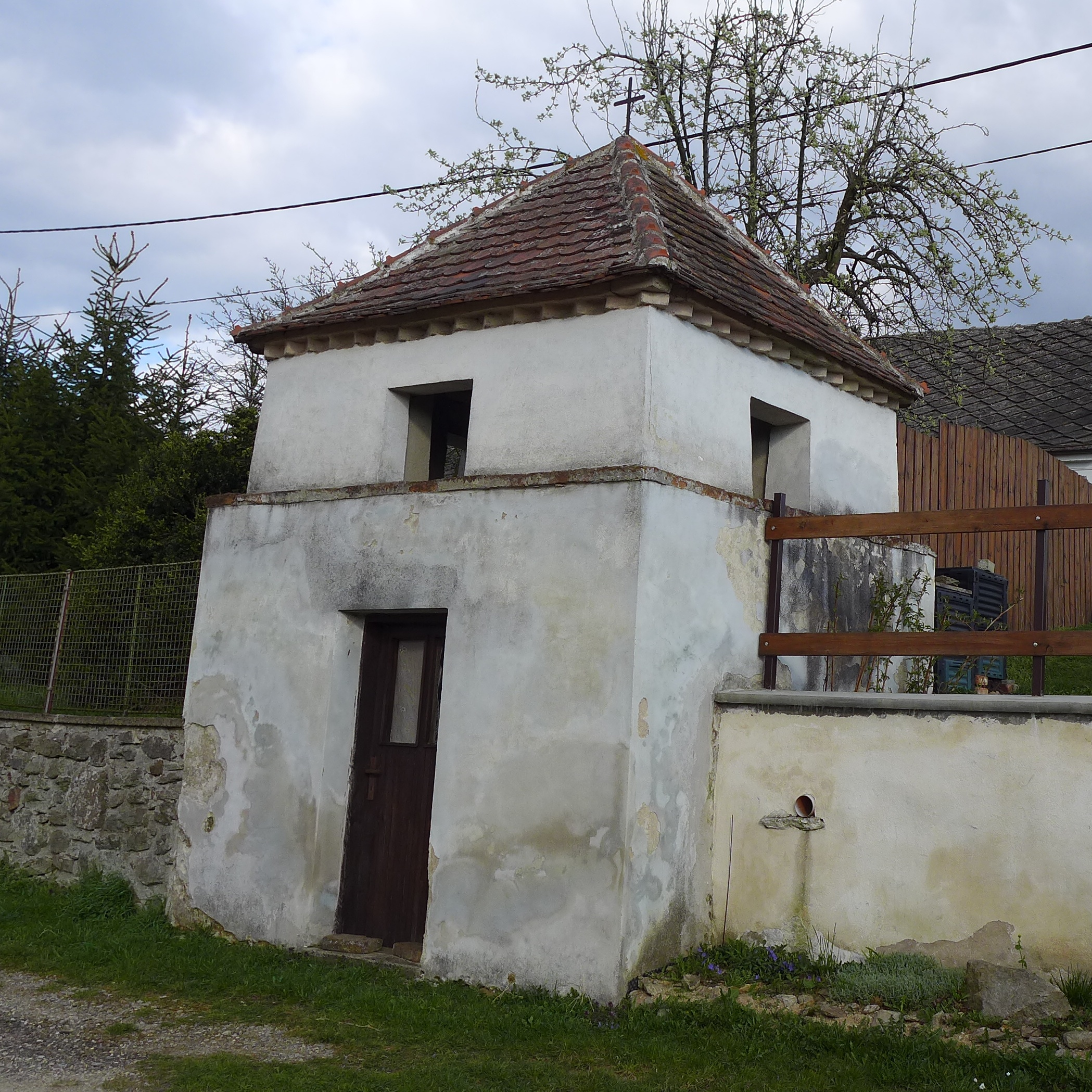 Kaplička, náves, Újezd (okres Znojmo).